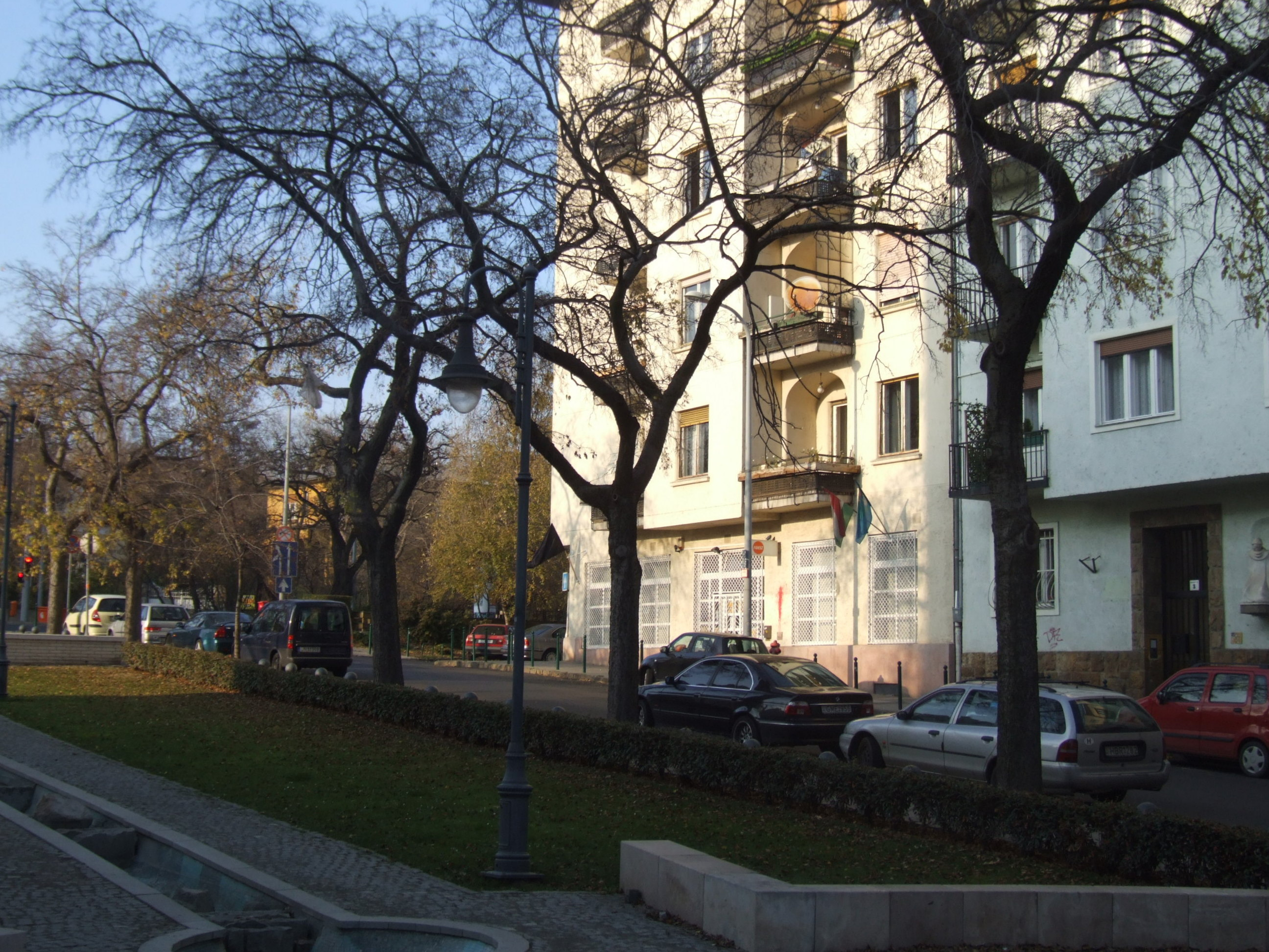 Csengey Dénes lakóháza a Királyhágó tér és Németvölgyi út sarkán.